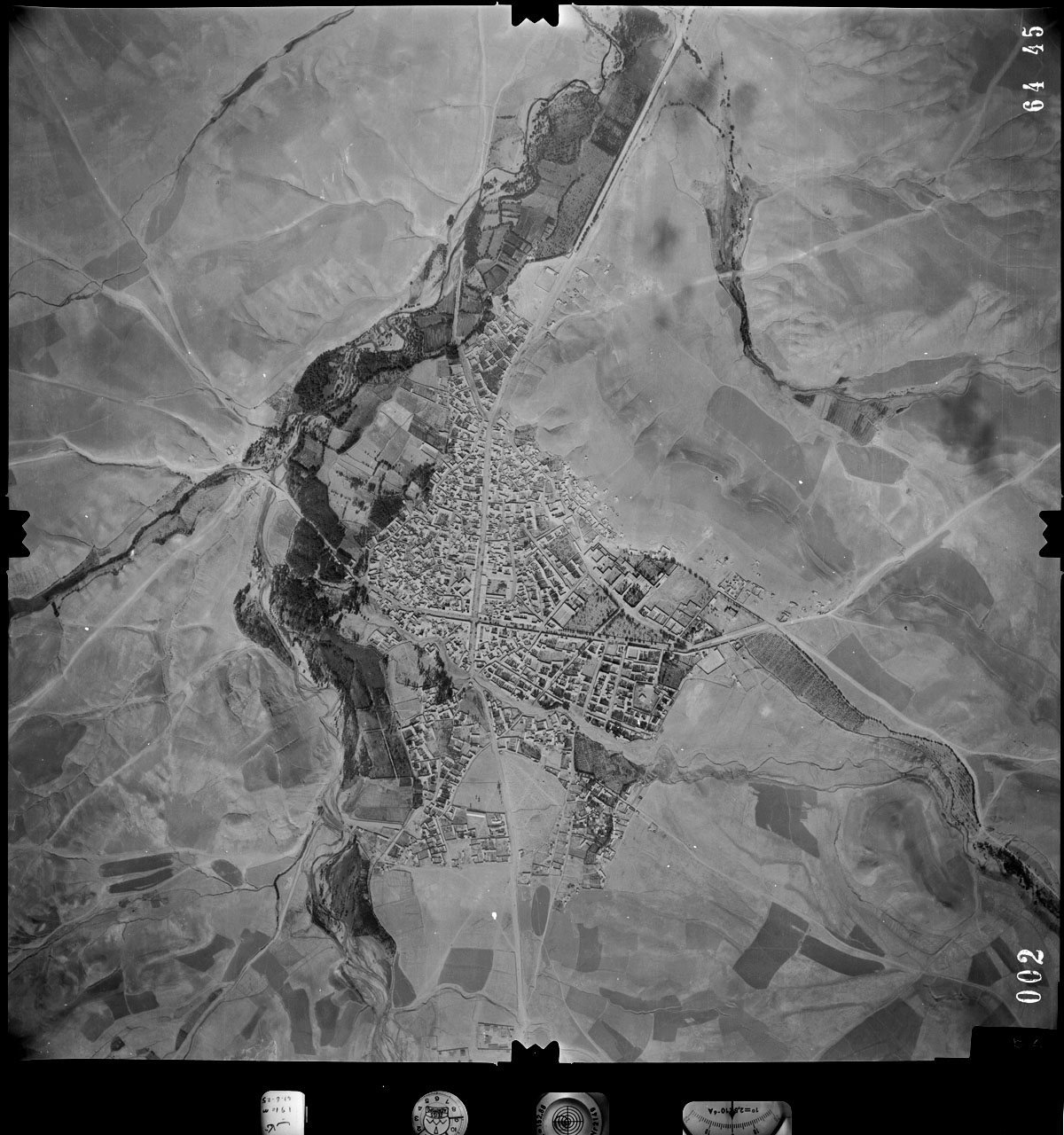 تۆرکجه: تیکان تپه افشار شهرین سالینمیش گویدن شکیلی 43 جی شمسی ایل لرده شهرین تاریخی بافتتی هله بیر چوخلو مهاجیر و جدید محله لر یوخدور